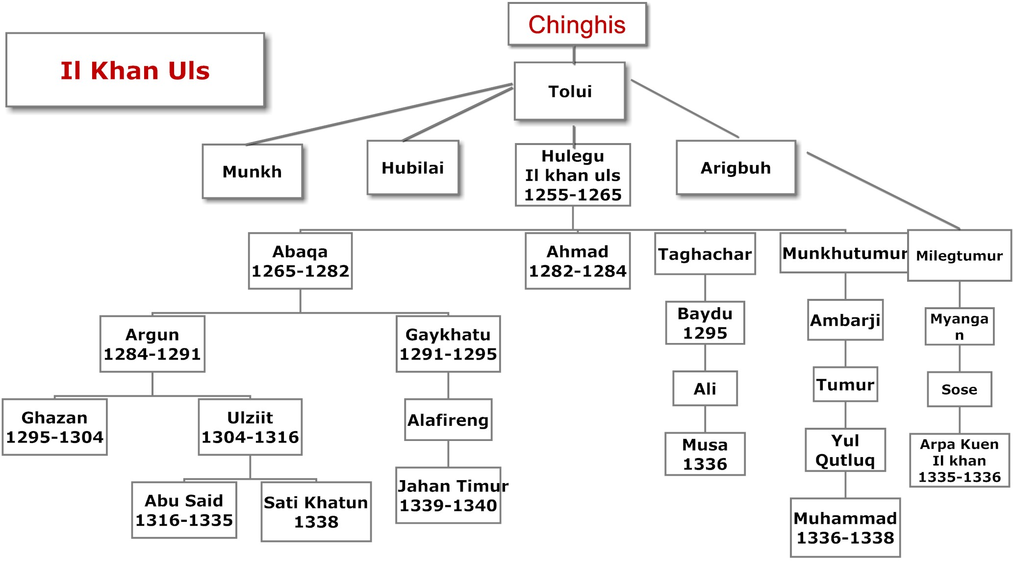 Монгол: Ил хаадын улсын хаад